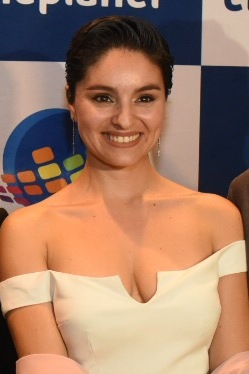 Ministra Paula Narváez asiste a avant premier de película Cabros de mierda en representación de la presidenta Bachelet.